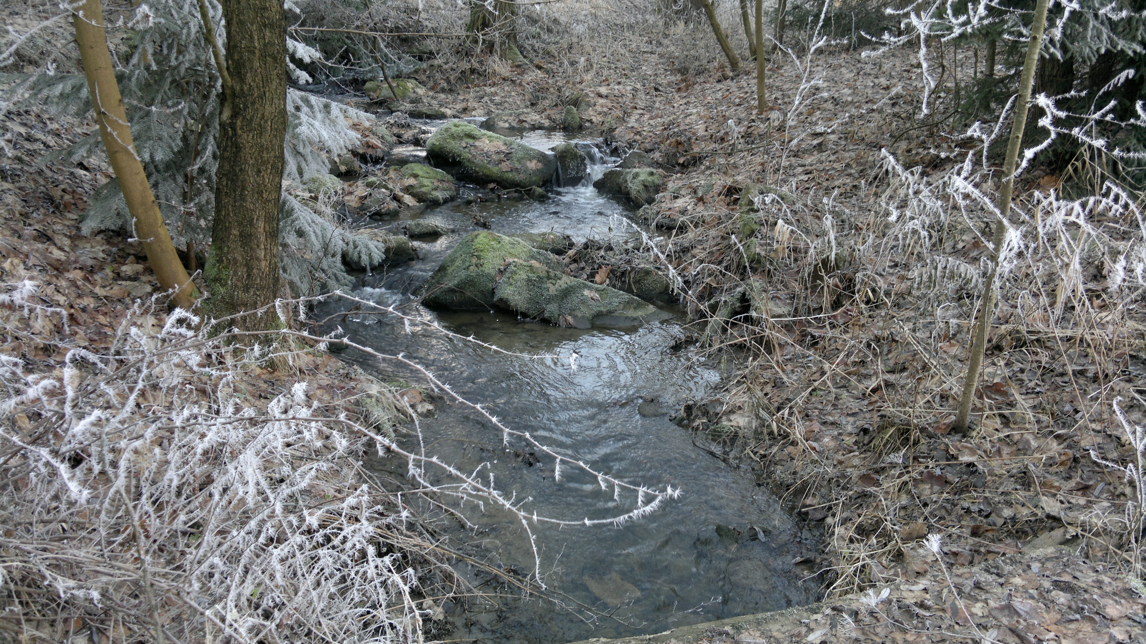 Rozkošský potok pod rybníkem Drátovec I v okrese Havlíčkův Brod